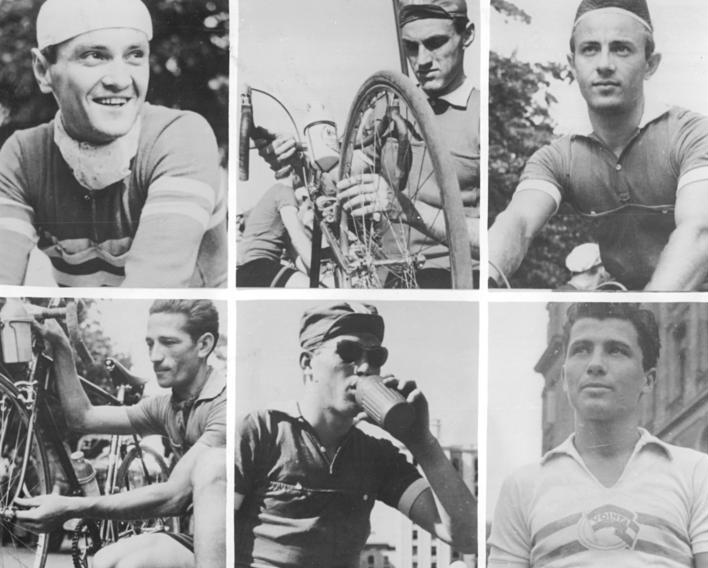 Friedensfahrt, Mannschaft aus Rumänien Zentralbild Repro Qu 2.5.1961 Rumäniens Friedensfahrtmannschaft. Obere Reihe vlnr: Ion Cosma; Ludovic Zanoni, Gabriel Moiceanu Untere Reihe vlnr: Serban Radulescu, Walter Ziegler, Ion Stoica